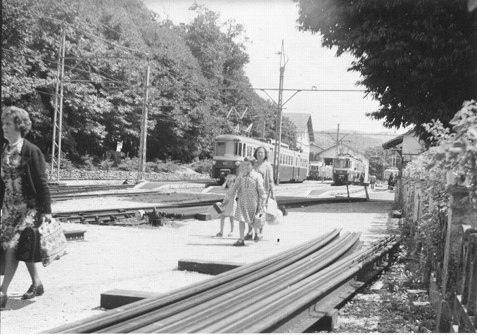 Foto della Stazione di Fiuggi alle ore 12,30